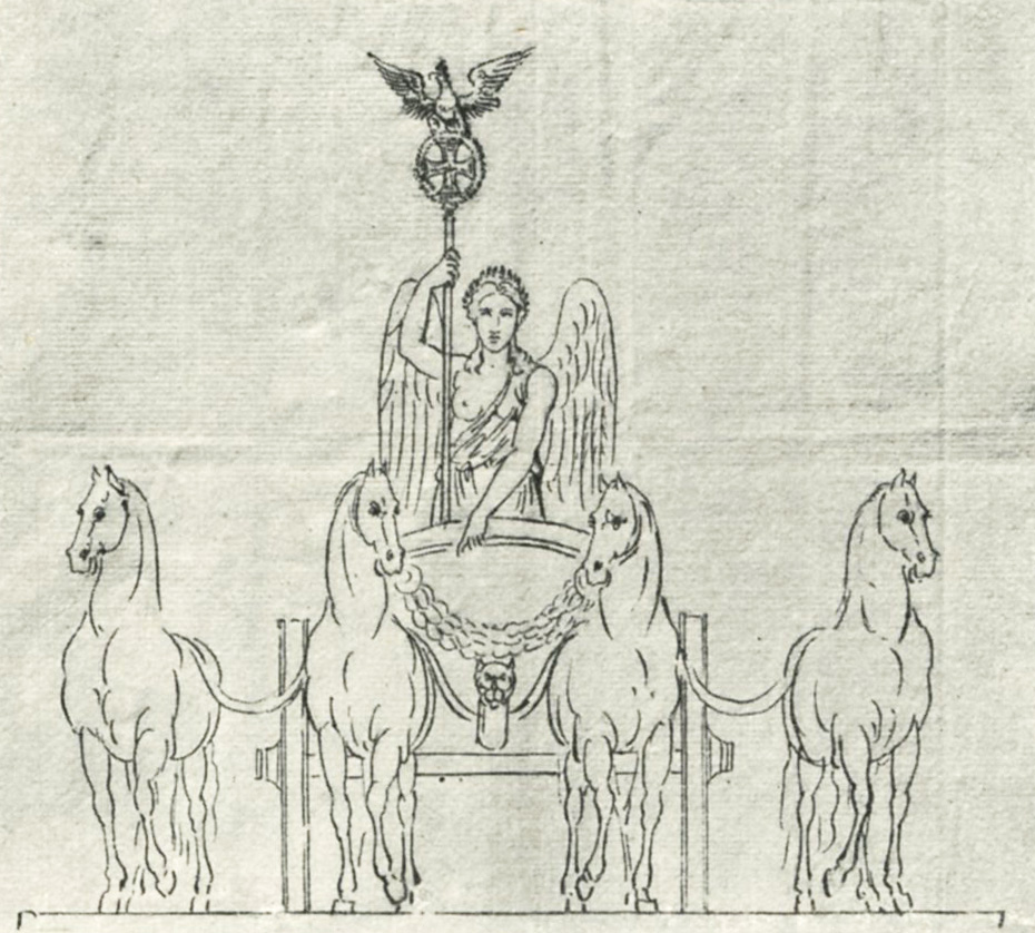 Skizze Schinkels von der Gruppe auf dem Brandenburger Tor mit seinem Entwurf zum preußischen Siegeszeichen. (Original Bildunterschrift von Julius Kohte)